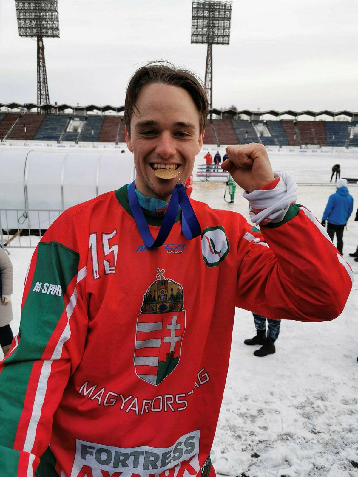 Even Lübeck med gullmedaljen etter VM-seieren.